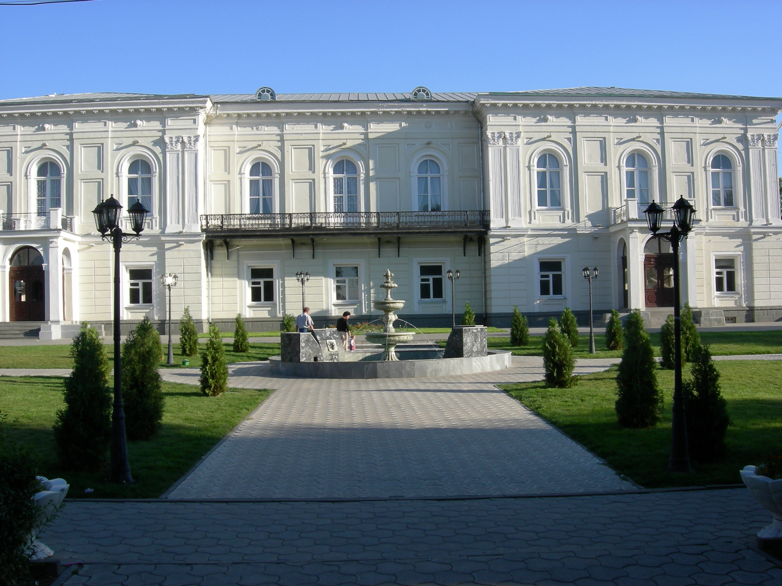 Изображение | Описание = Атаманский дворец в Новочеркасске | Автор = Путилин Денис | Время создания = 9 сентября 2006 | Источник = Архитектор И. О. Вальпреде. 1863 год. Стиль — эклектика(ампир+поздний классицизм). Объект культурного наследия регионального значения. До 1920 года являлся резиденцией атамана Всевеликого Войска Донского, а также императора и других высочайших особ в дни их пребывания на Дону. Во время Гражданской войны здесь находился штаб руководителей контрреволюции. В Советское время здесь располагалась городская власть. В марте 2001 года здание было отдано музею истории Донского казачества и в настоящее время является его филиалом.